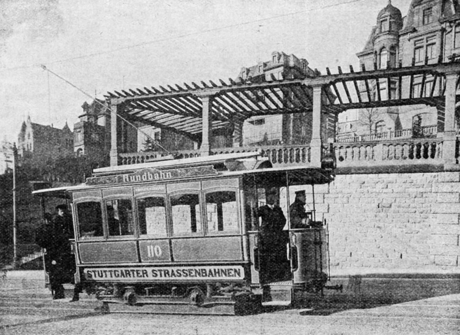 Stuttgarter Straßenbahn; Wagen 110 auf der Rundbahn